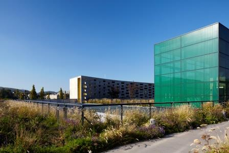 Futuro Liestal, Gräubern Quelle: Informationsdienst Stadt Liestal